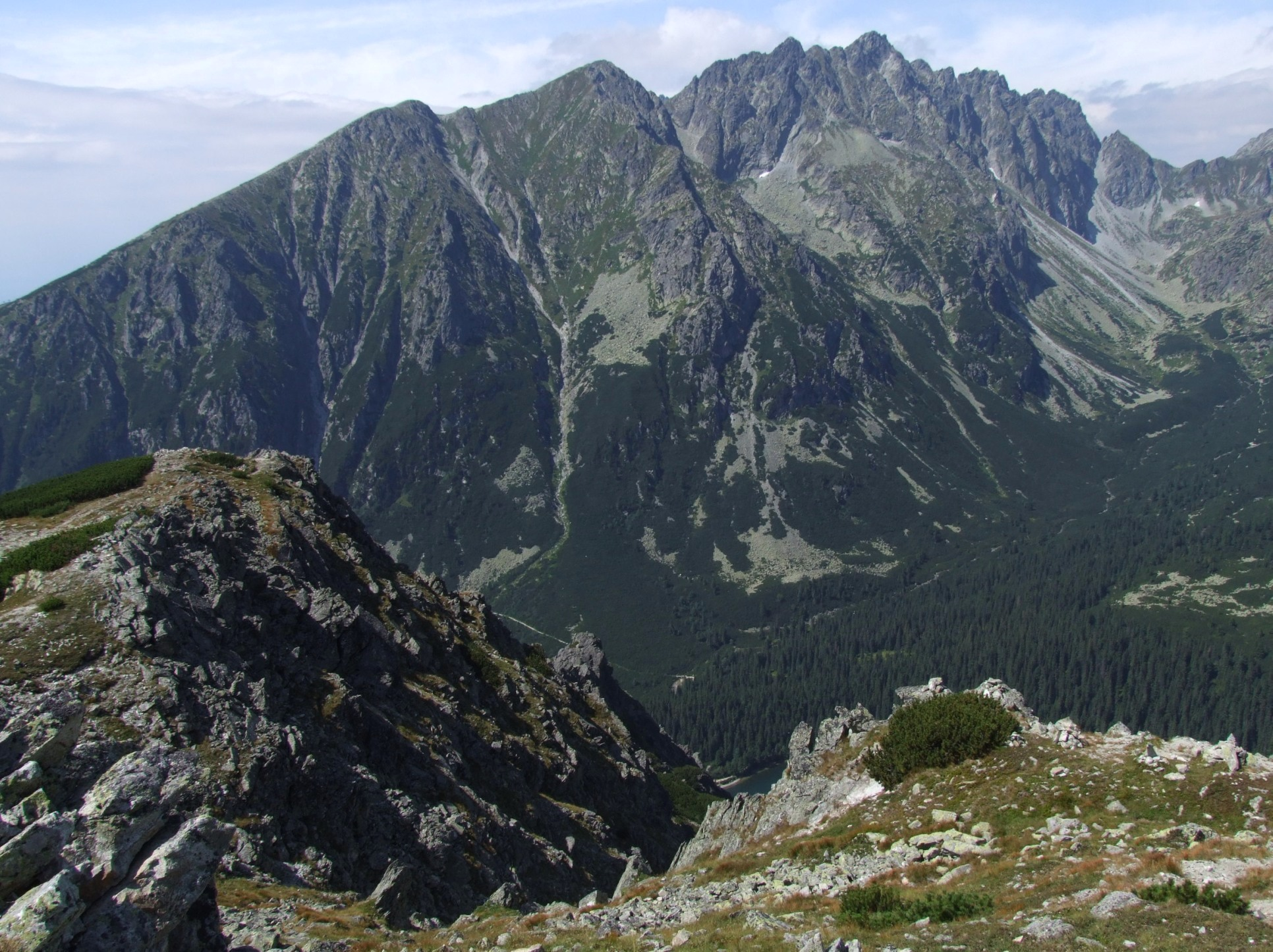 Grań Baszt i Dolina Mięguszowiecka, widok z Osterwy